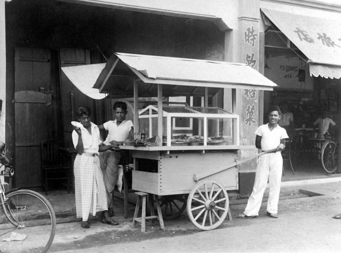 Repronegatief. Eem kar met warong, Medan